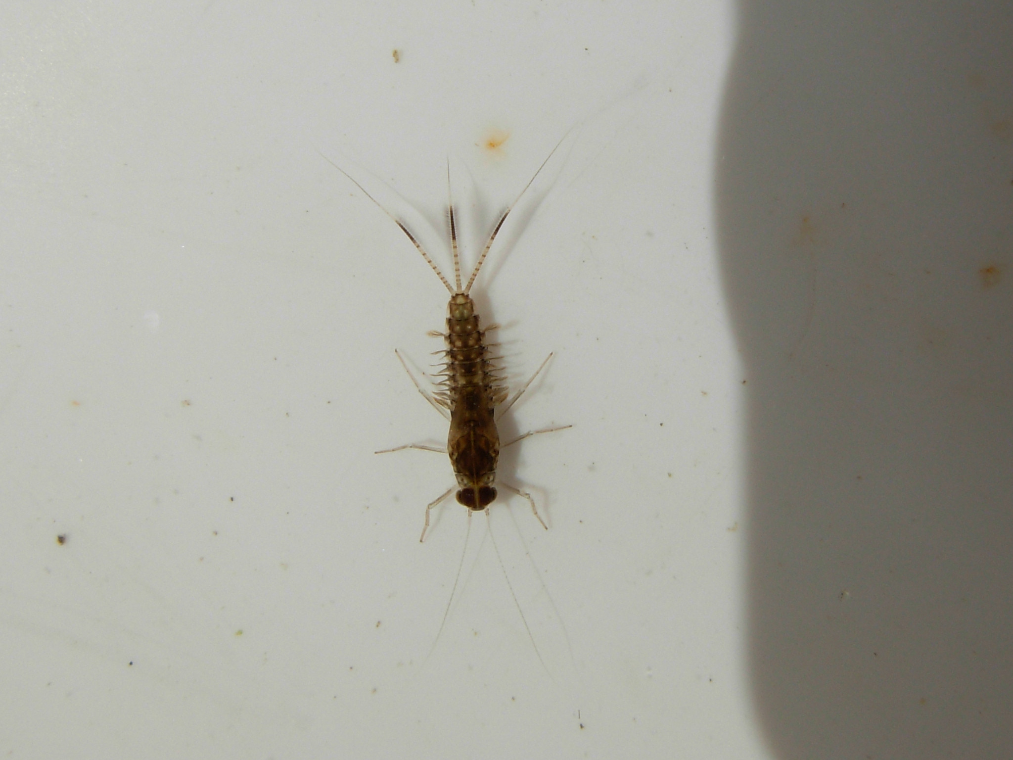 Cloeon dipterum larva, larve de mouche de mai